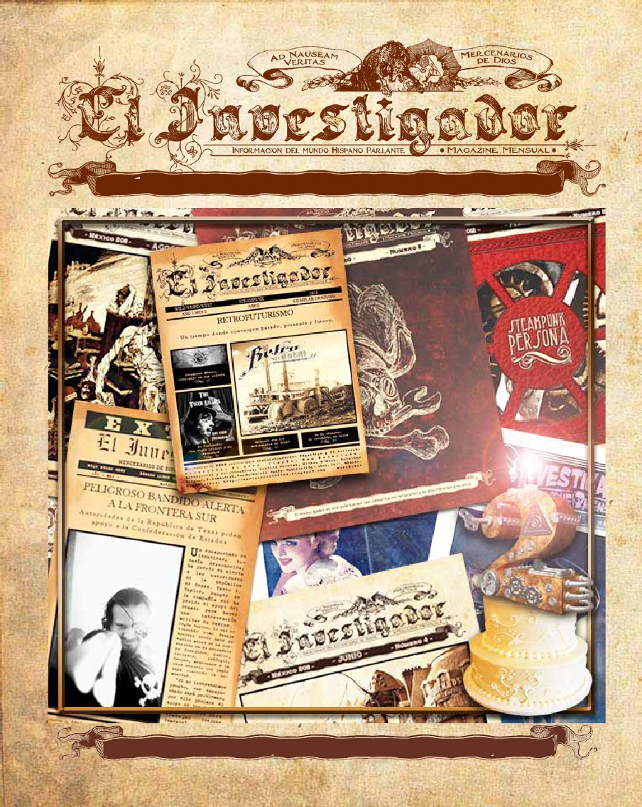 El Investigador #25 especial de 2° Aniversario